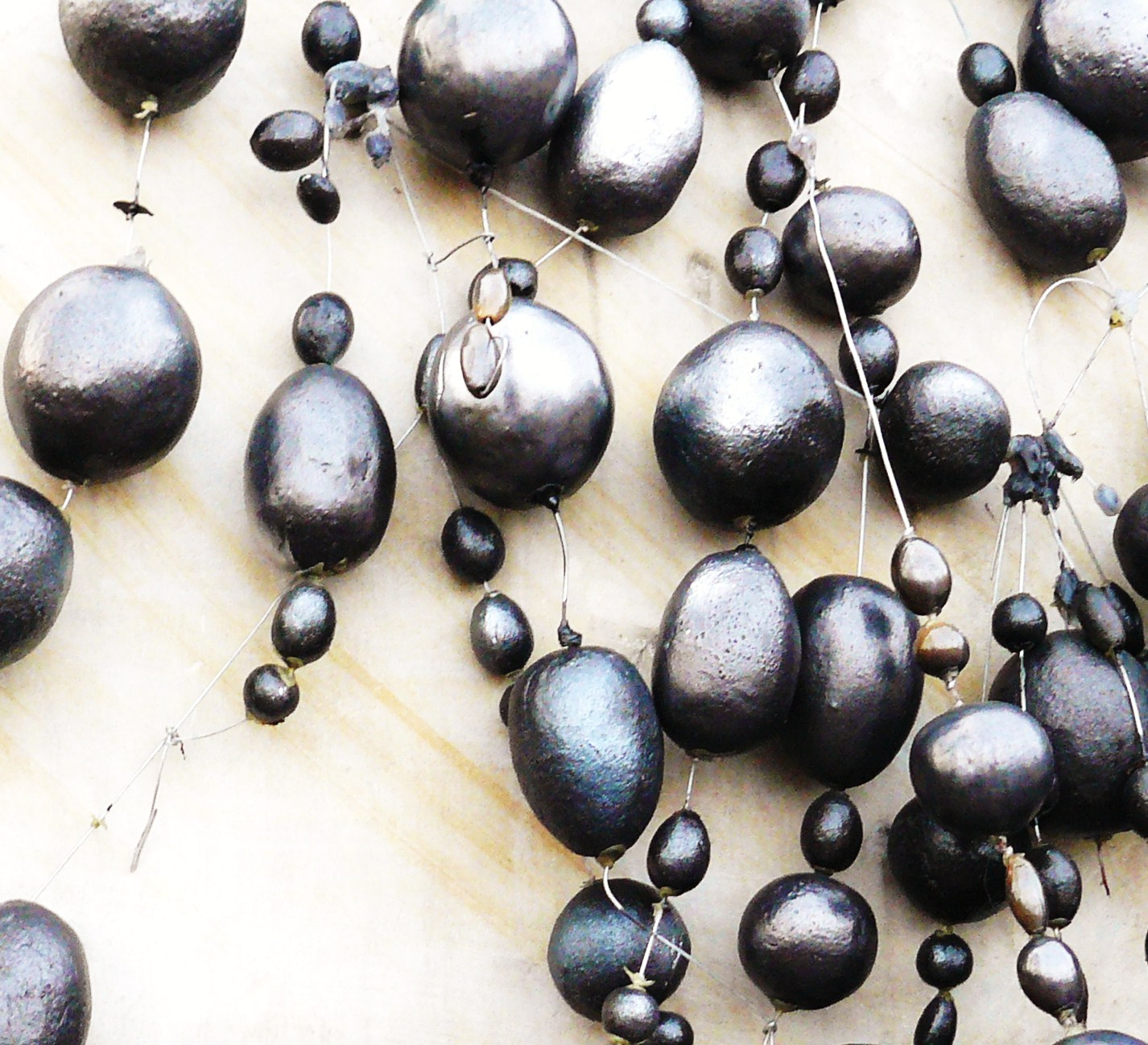 Ziarno - Epitafium Życia (fragm.). Poznań, Cytadela. Proj. Andrzej Banachowicz. V 2009.